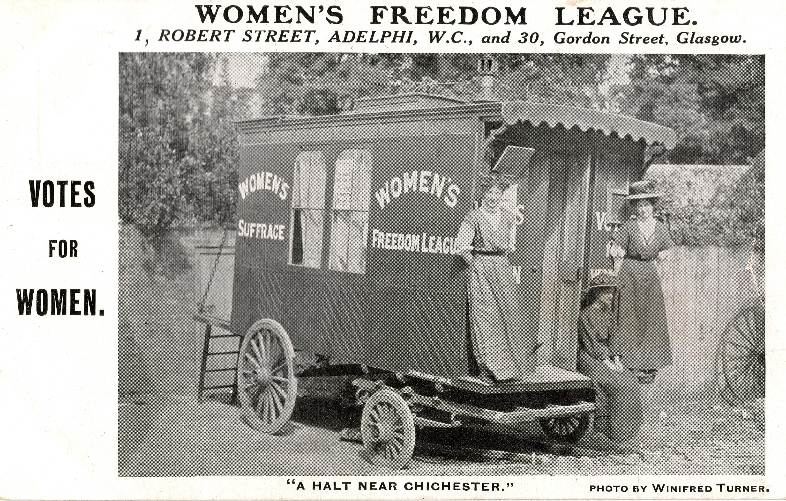 twl 2002 327